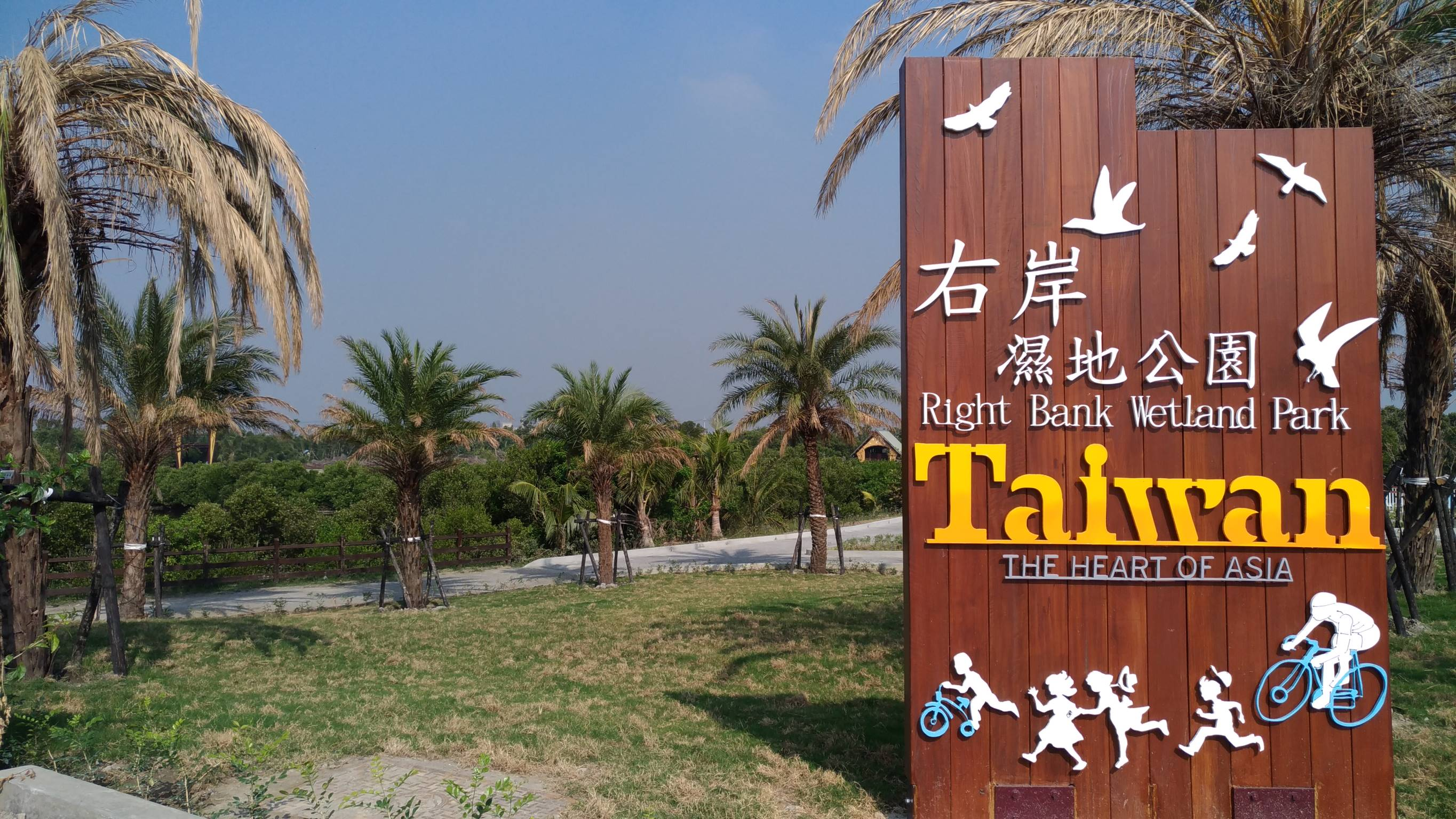 大鵬灣國家風景區右岸濕地公園